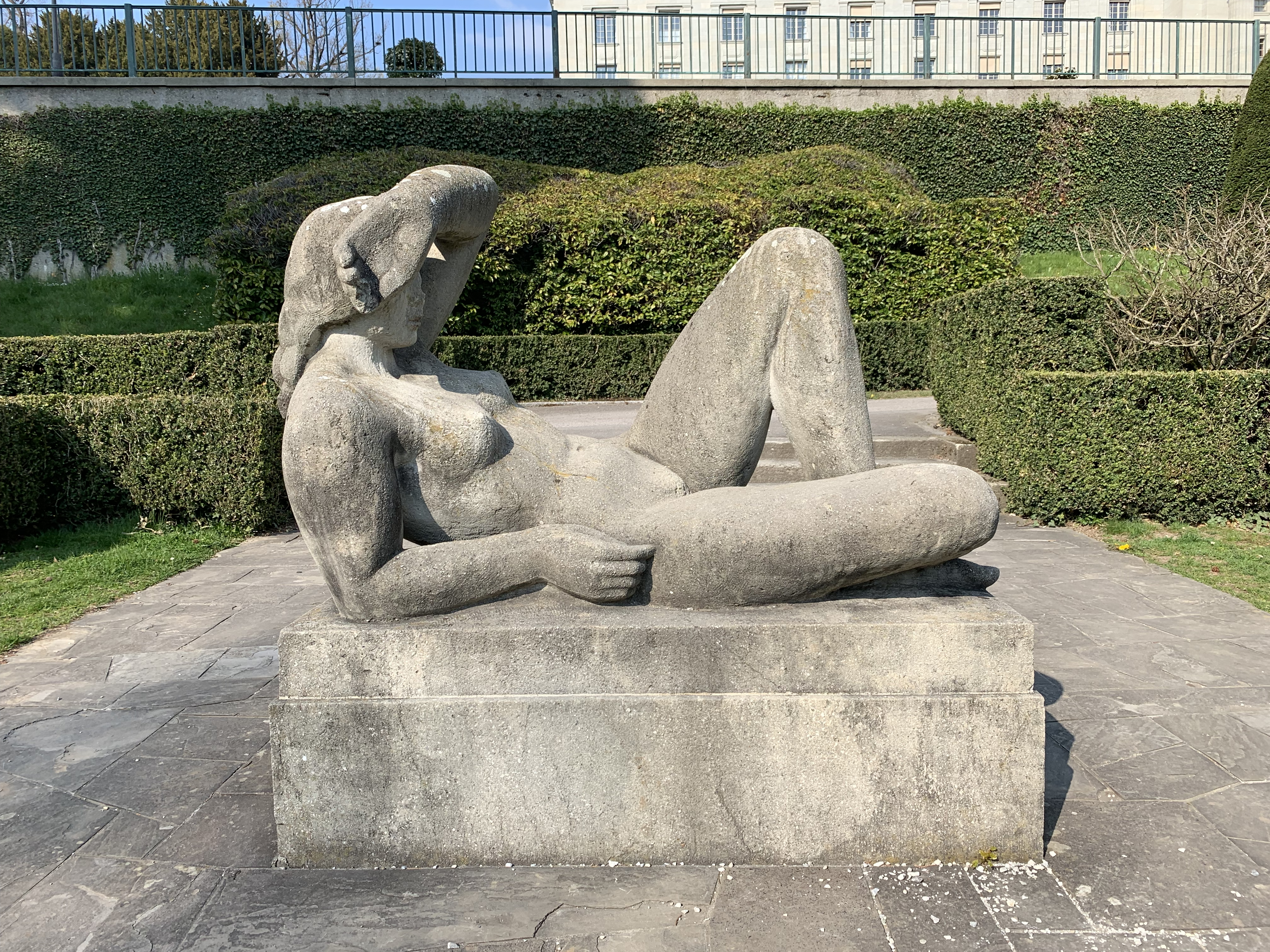 L'été (Pierre Blanc) au Parc de Mon-Repos, Lausanne, avril 2019.